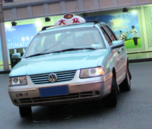 Volkswagen Santana aperçue à Shanghai en Chine.